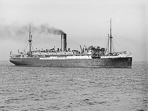 Il piroscafo Wandilla (poi Fort St. George, poi Cesarea, poi Arno) in servizio sulle linee dell'Australia